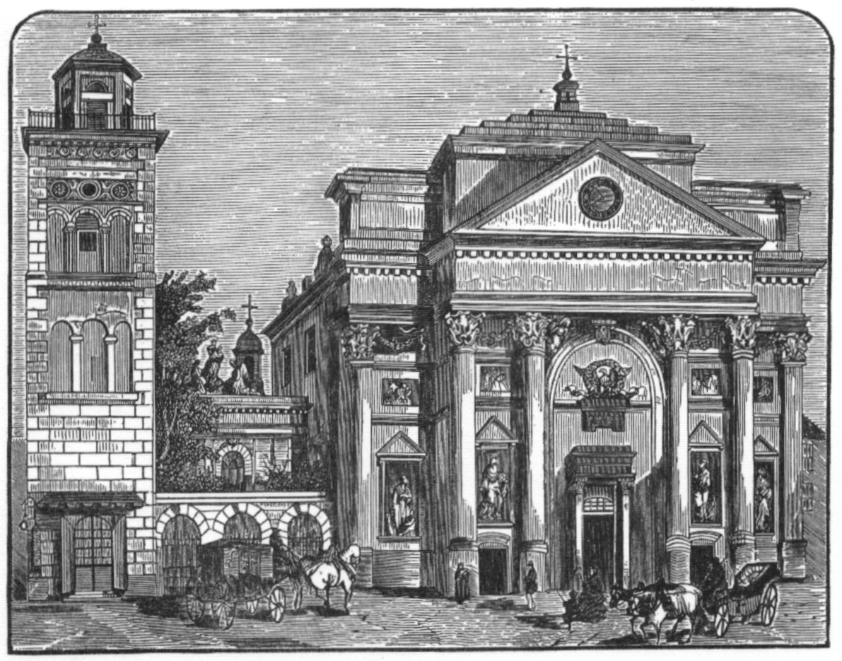 Kościół św. Anny przy ul. Krakowskie Przedmieście w Warszawie (pobernardyński)